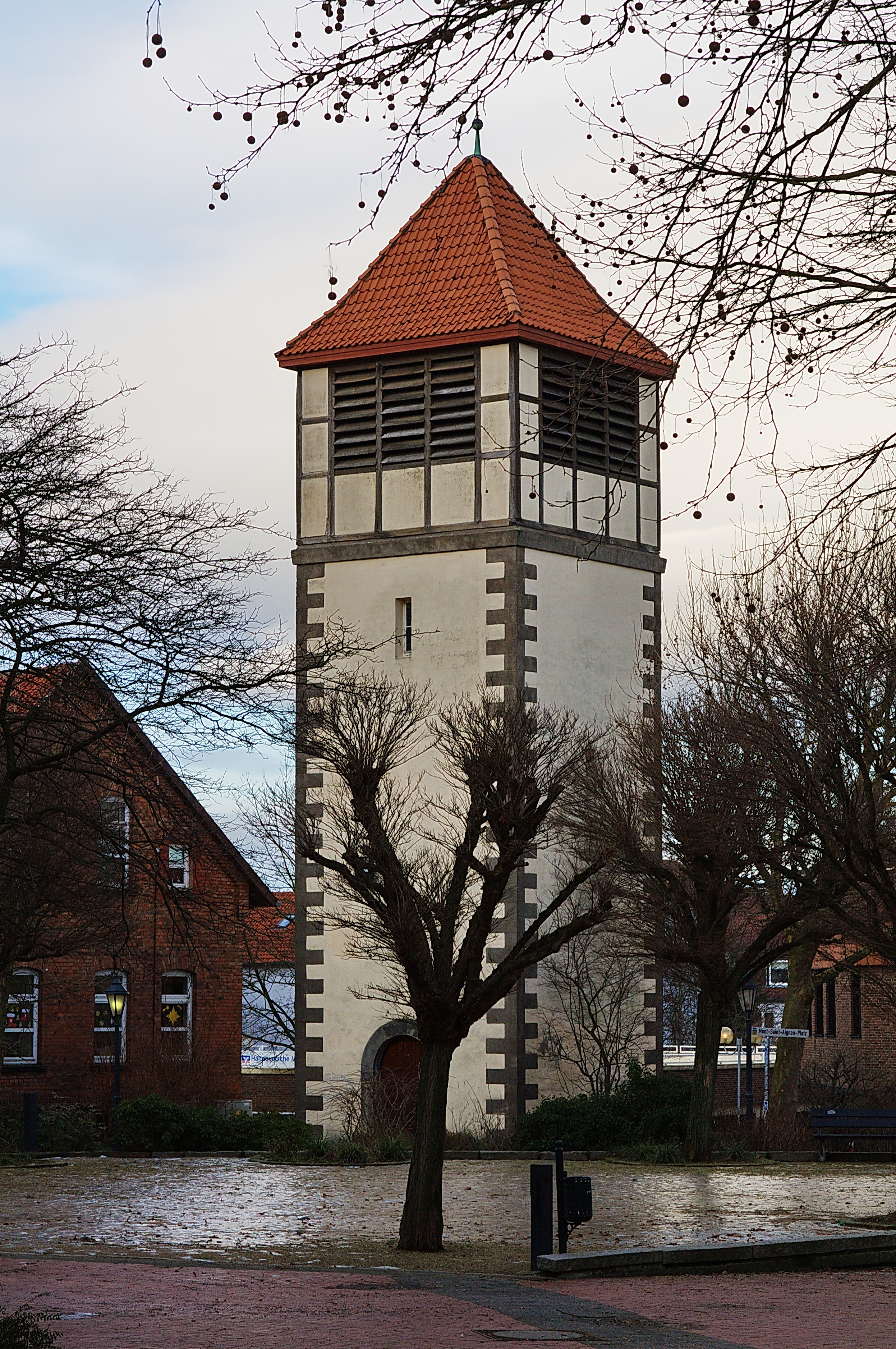 Glockenturm der Klosterkirche Barsinghausen, Niedersachsen, Deutschland